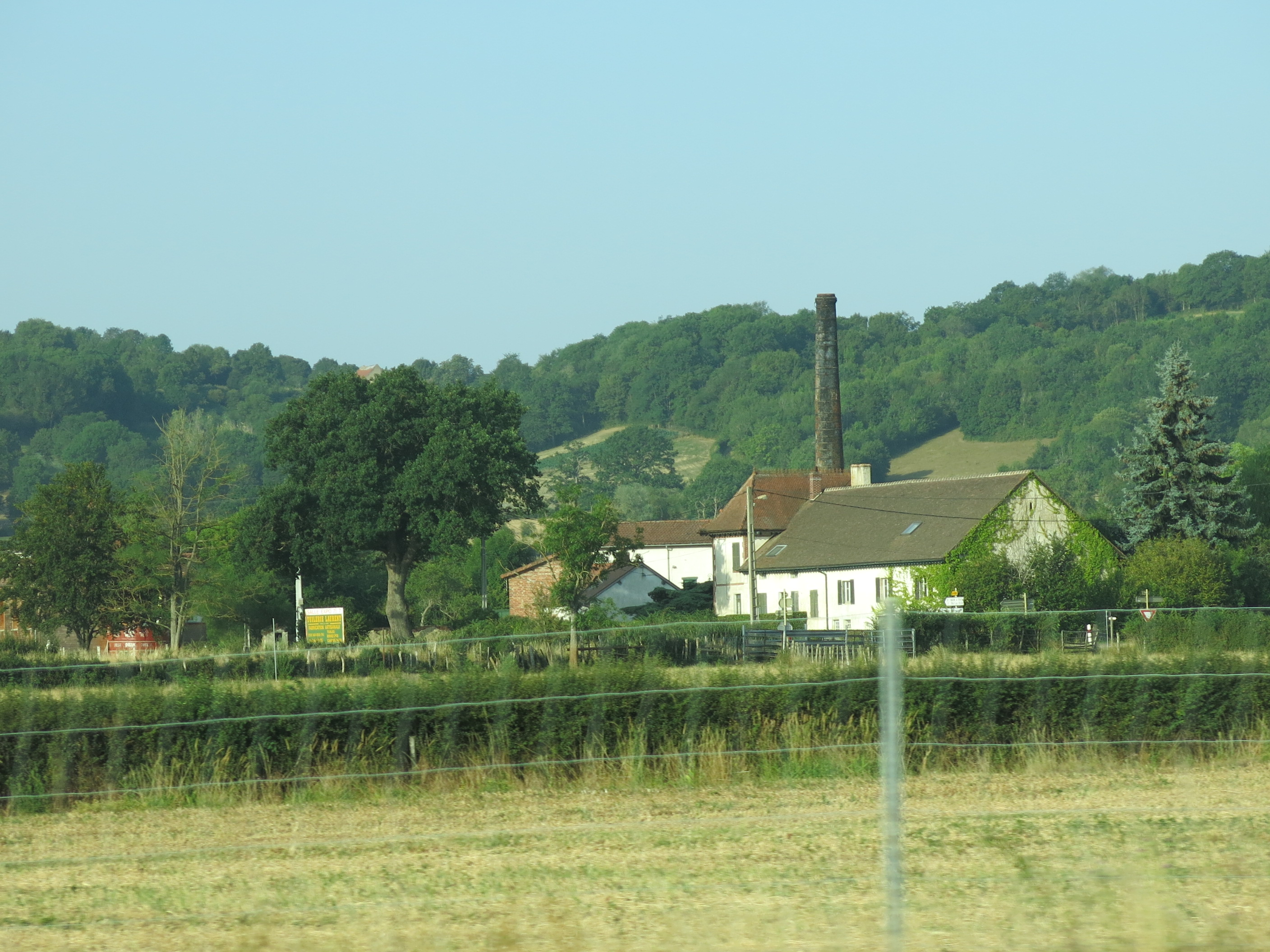 Tuilerie Laurent à Nan-sous-Thil (Côte-d'Or, France).